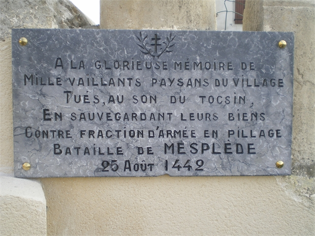 MESPLEDE plaque bataille